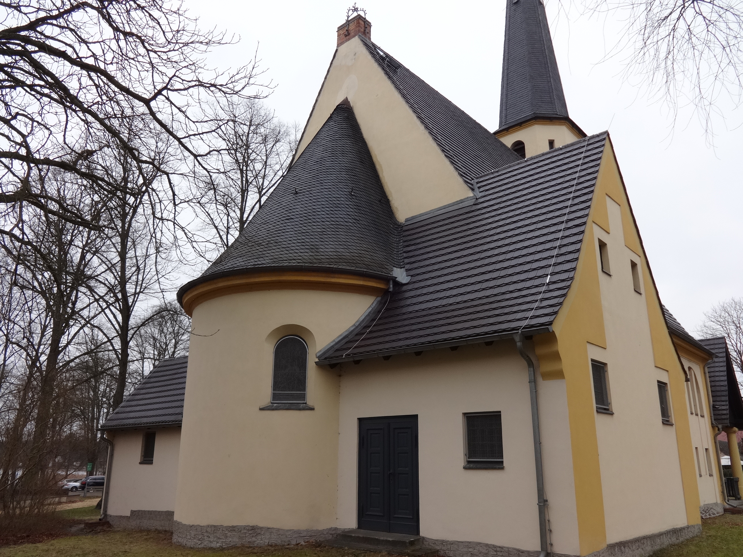 Christuskirche von Georg Büttner, im Heimatstil zwischen 1914 bis 1916 errichtet